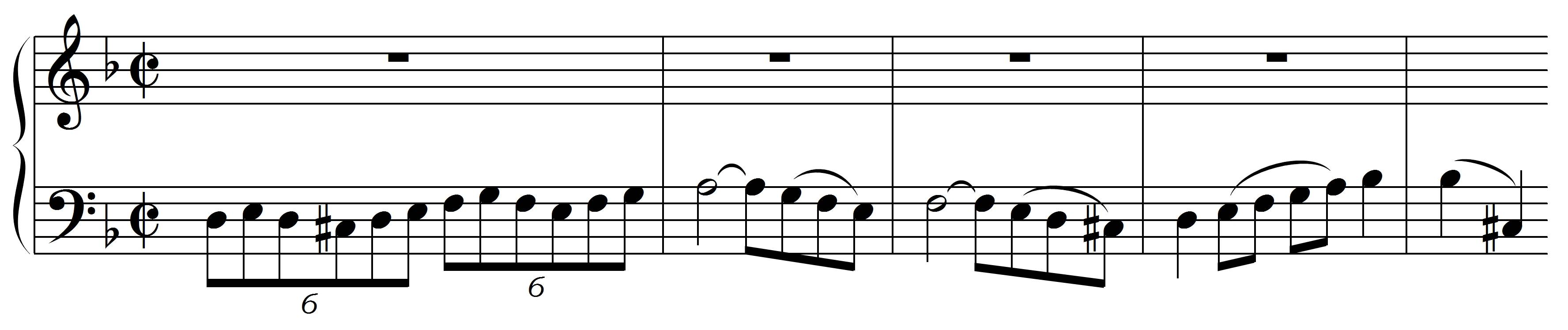 Bach, JS, Incipit Contrapunctus 17, BWV 1080